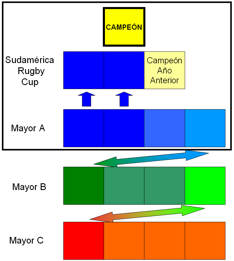 Campeonato Sudamericano de Rugby Union desde 2014. Cuatro niveles: Sudamerica Rugby Cup, Mayor A, Mayor B y Mayor C. Los dos primeros del nivel Mayor A, compiten con el campeón del año anterior por el campeonato (Sudamérica Rugby Cup). El último de los niveles Mayor A y Mayor B, juegan un partido con los primeros de los niveles Mayor B y Mayor C, por el ascenso.